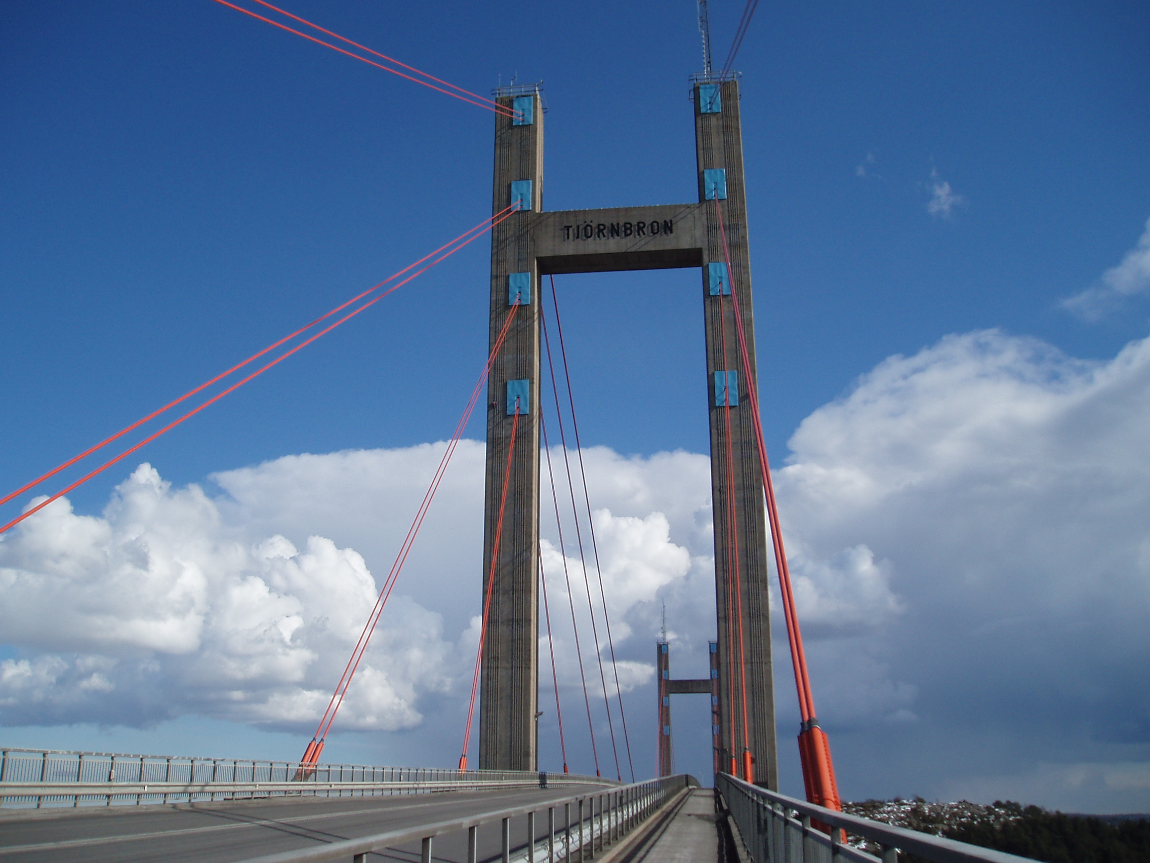 Tjörnbron zwischen Tjörn und Stenungsund. K. Renz (2006)